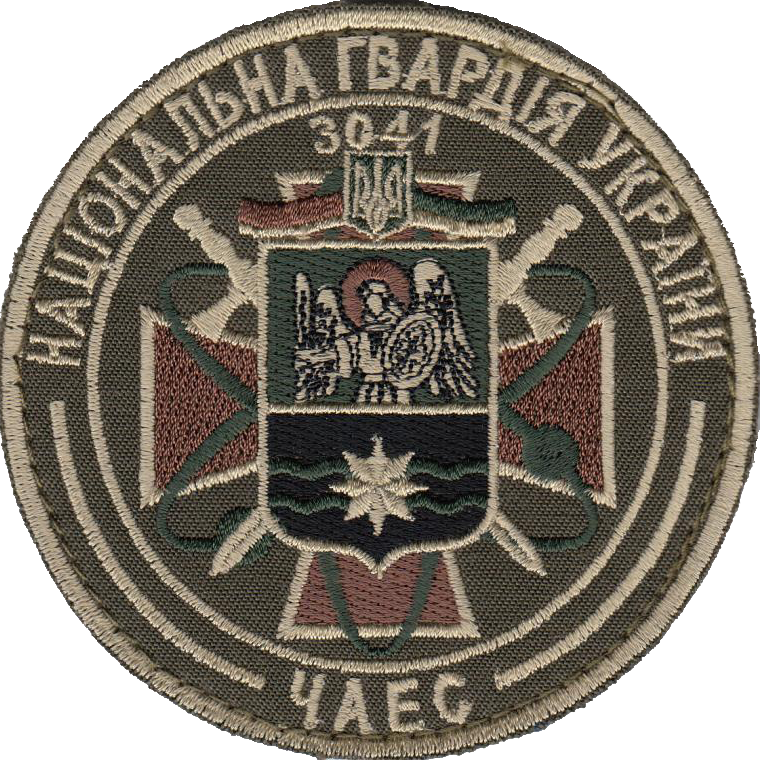 Нарукавный знак 1-й отдельный батальон охраны особо важных государственных объектов НГУ (в/ч 3041, г. Славутич, Киевская область)